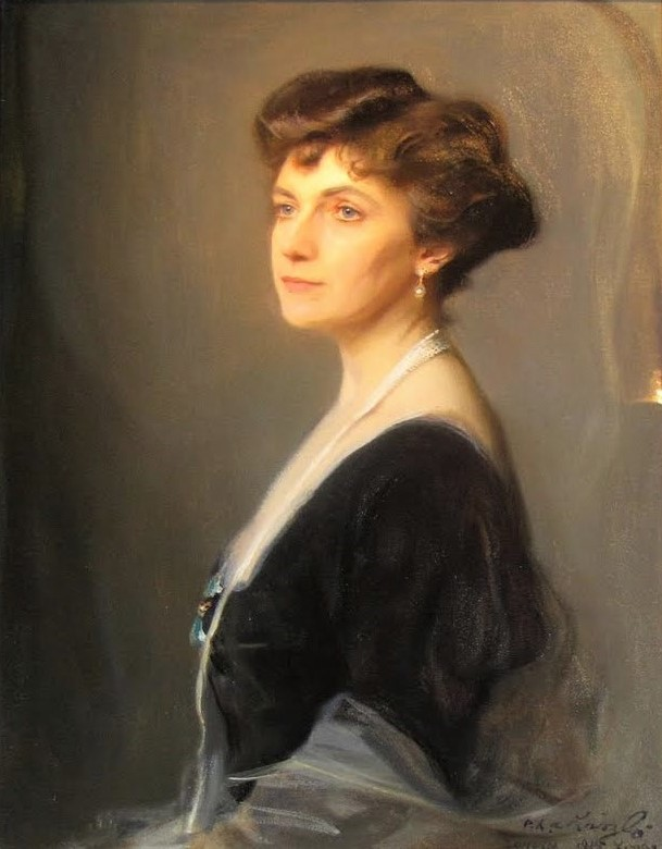 Portrait de Elsie Reford, fondatrice des Jardins de Métis, exposé à la Villa Estevan